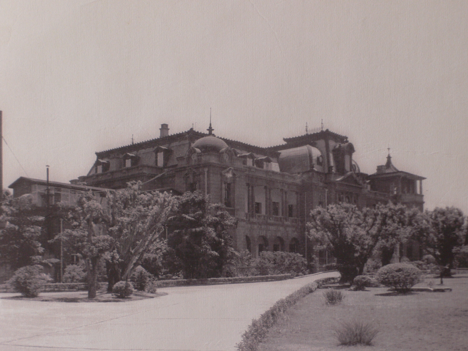 Bân-lâm-gú: 1964-nî ê Tâi-pak Pin-kuán.